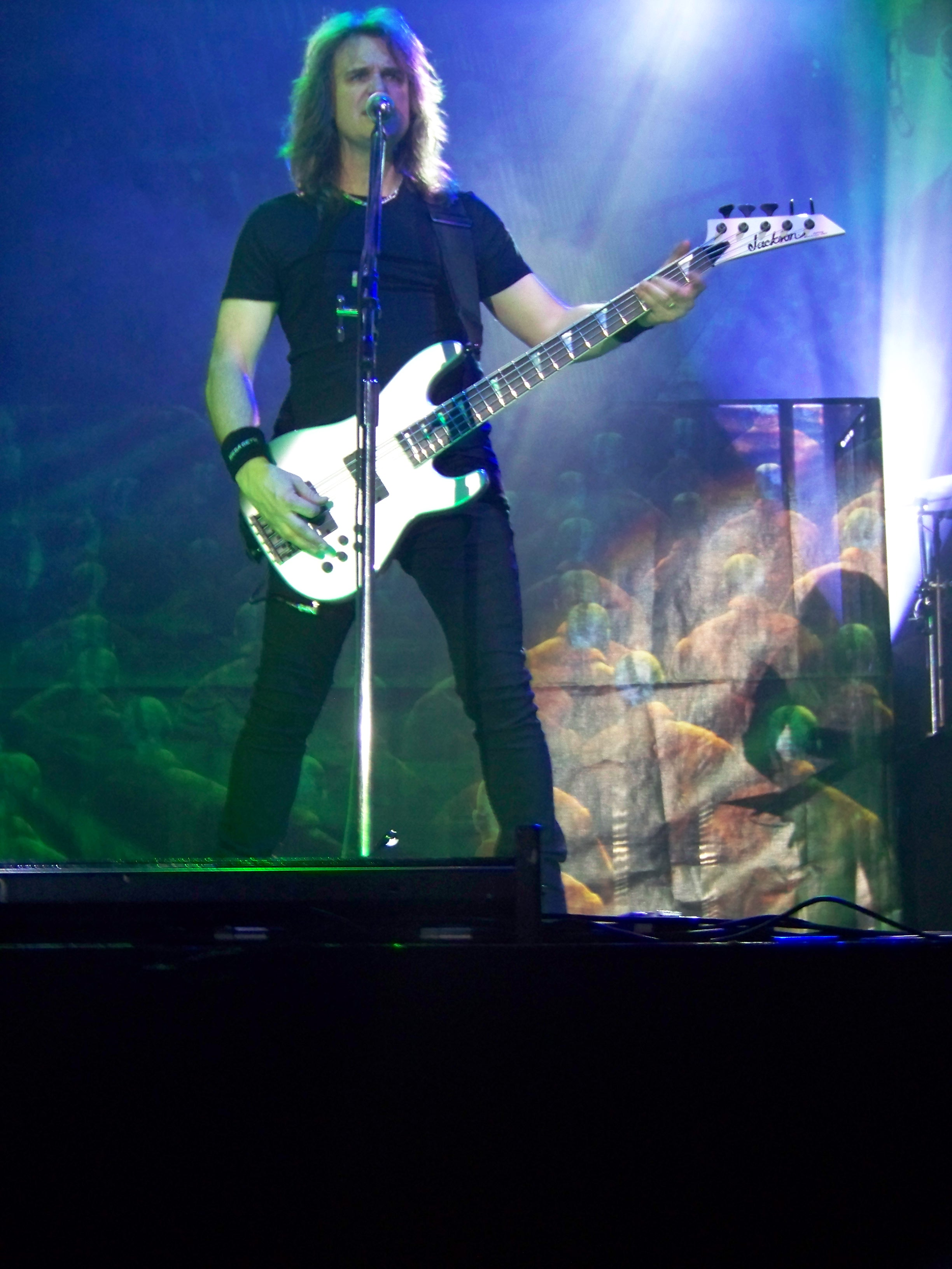 Фото Дэвида Эллефсона из Megadeth. Март 2011, Киев, концерт Megadeth и Slayer.